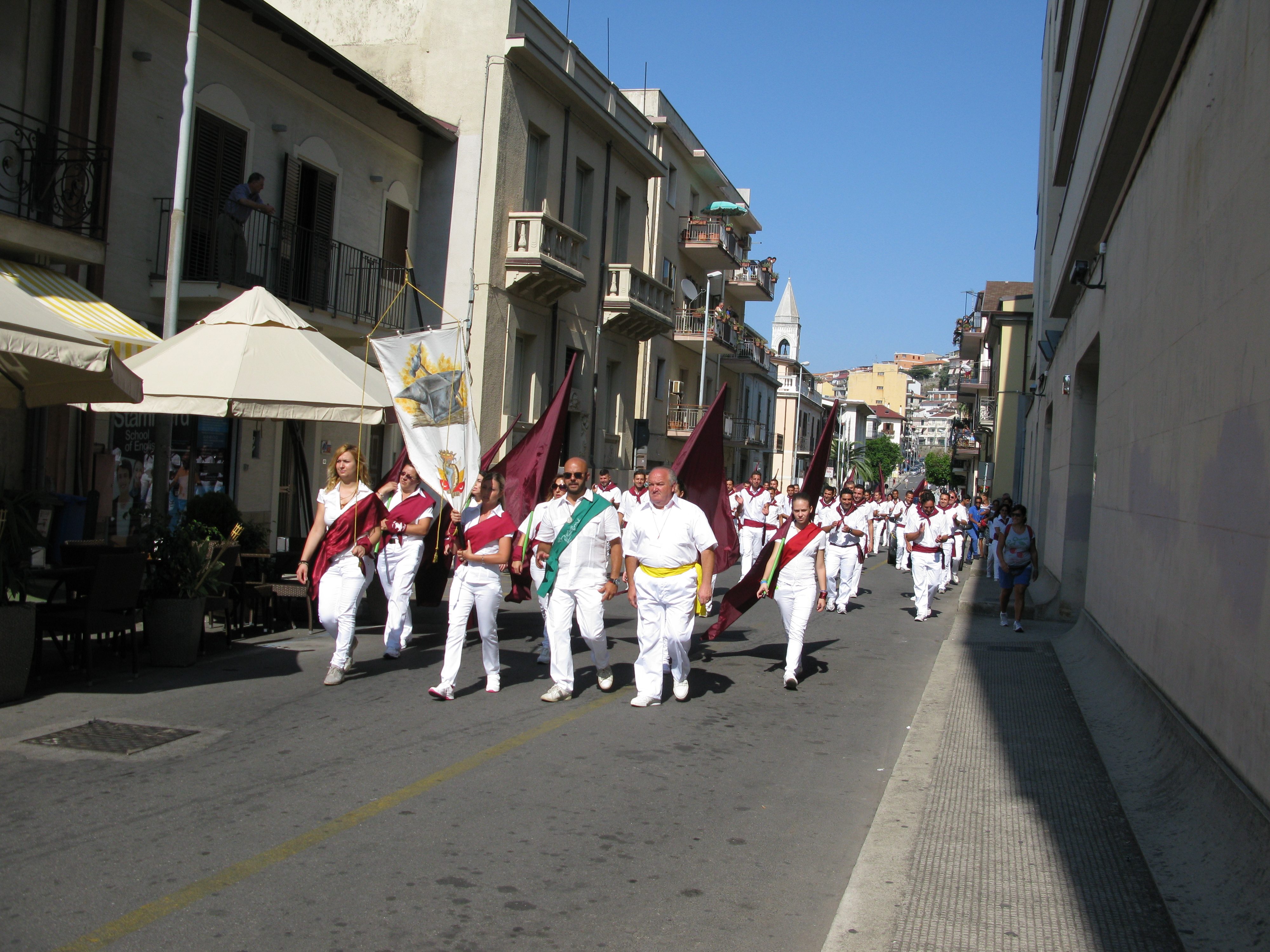 Artigiani